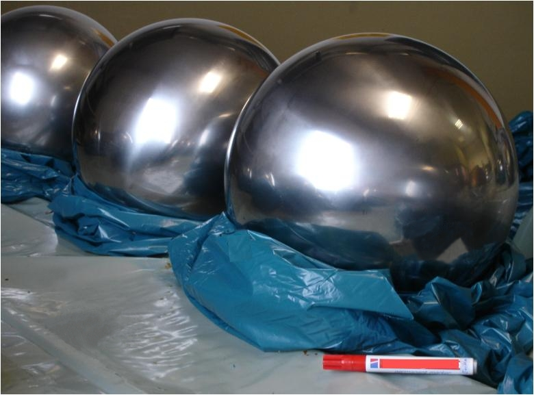 Kugel Ø 320mm